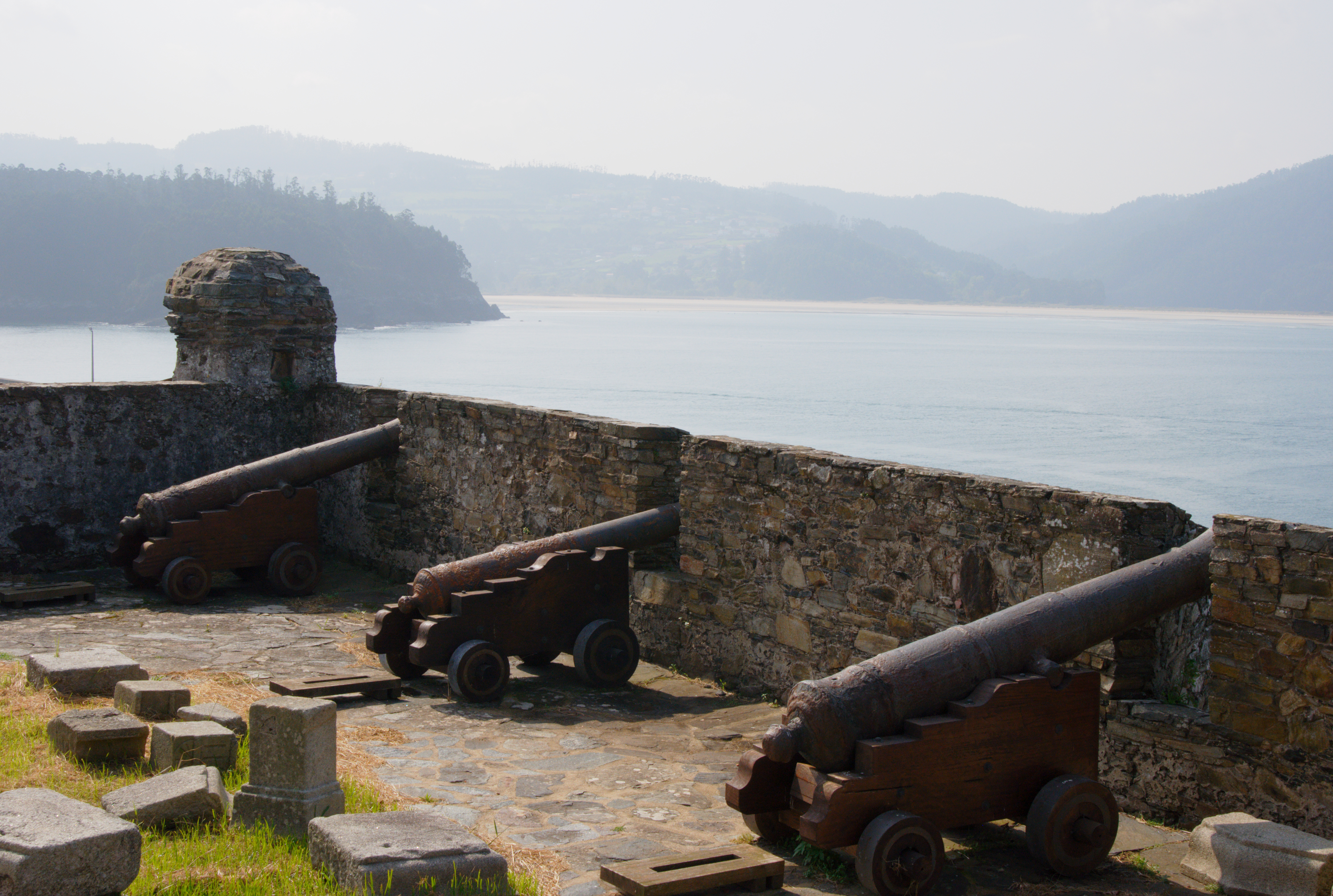 Castelo da Concepción; Cedeira, Galicien